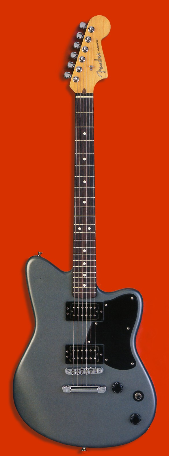 Fender Toronado